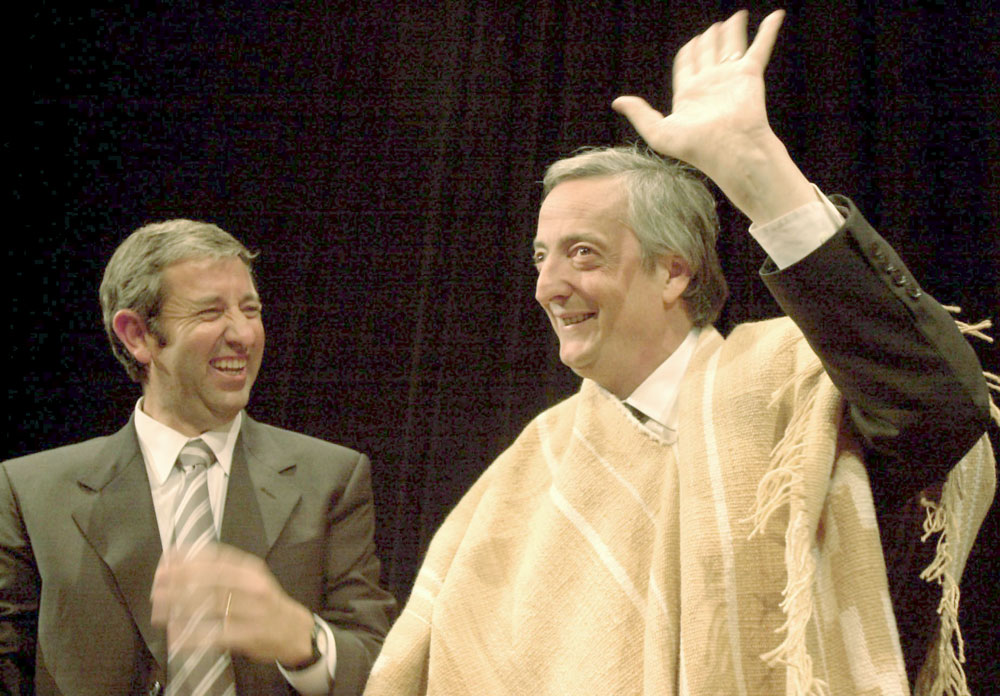 Governador de Mendoza, Julio César Cobos y el Presidente de La República Argentina, Néstor Kirchner foto oficial